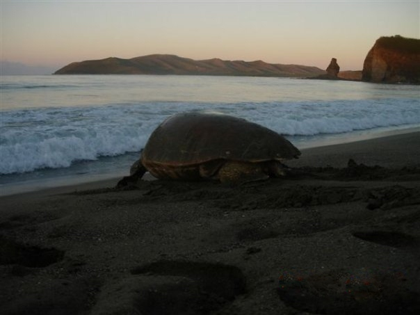 tortue à la roche percée